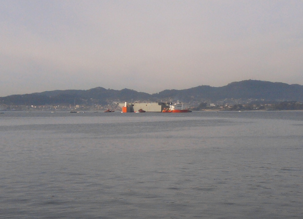 Manobra de carga do casco do buque HMAS Adelaide (LHD 01) na Ría de Vigo. 10/12/2013. O buque construído parcialmente en Navantia Ferrol envíase aos estaleiros BAE Systems Australia para a súa finalización.